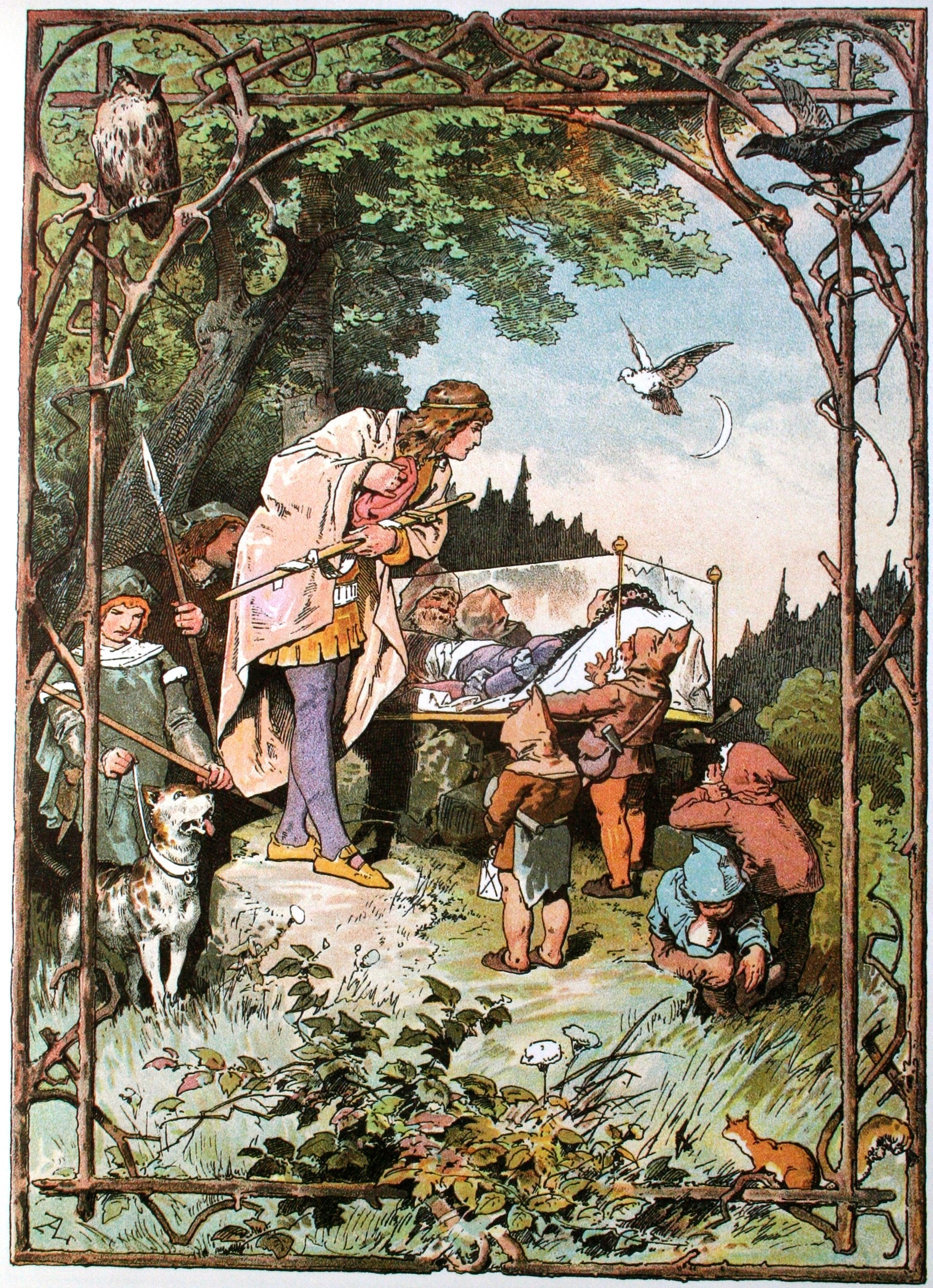 Schneewittchen; Darstellung von Alexander Zick (1845 - 1907)